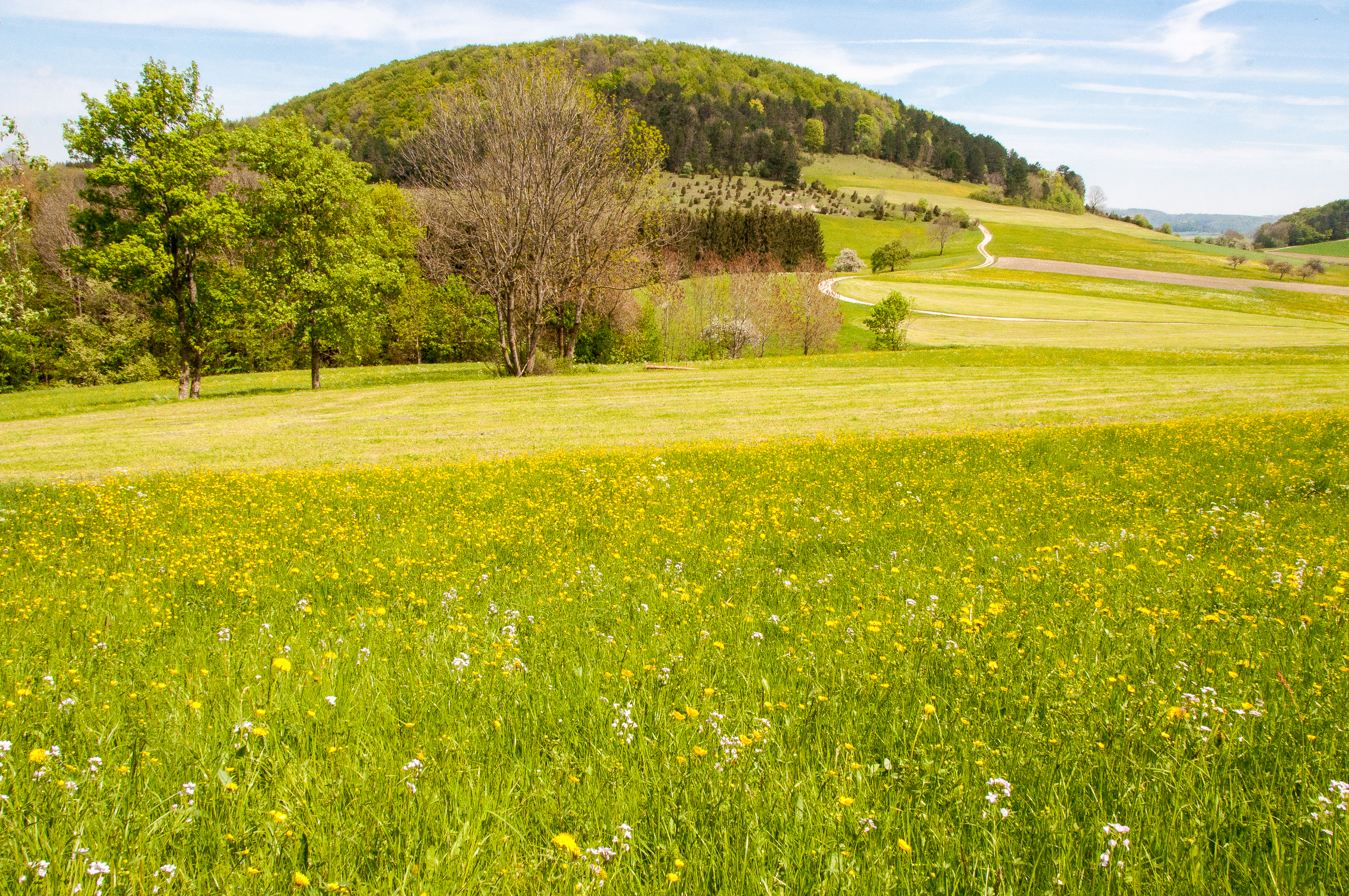 FFH-Gebiet DE-7423-342 „Filsalb“ im Landkreis Göppingen, Baden-Württemberg: In Bildmitte der Fränkel, Teil der Mittleren Kuppenalb, umgeben von einem Blumenmeer im Mai. Am Hang unterhalb des Waldes eine „klassische“ Wacholderheide.